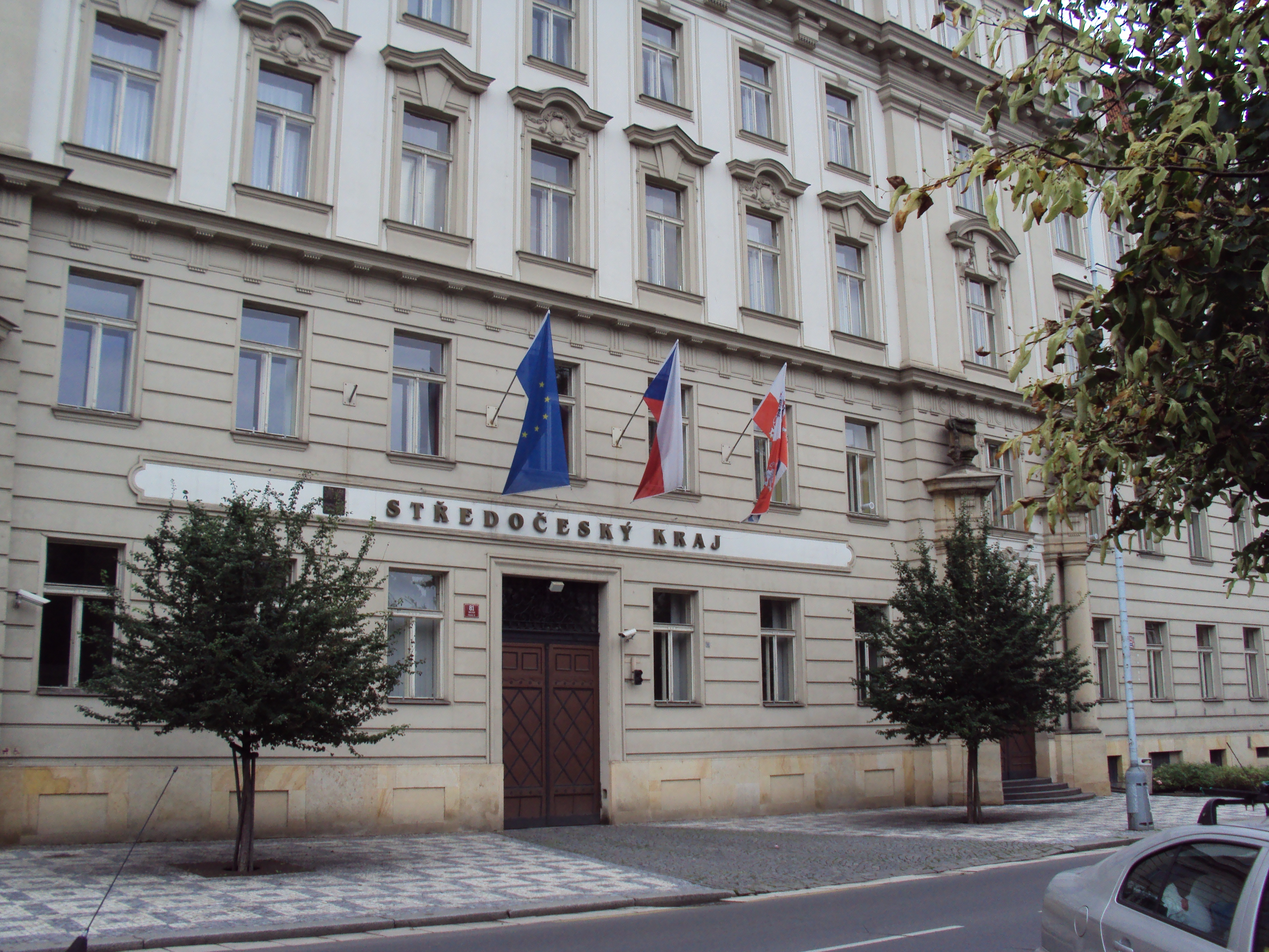 Sídlo Krajského úřadu Středočeského kraje v Praze na Smíchově, Zborovská 11